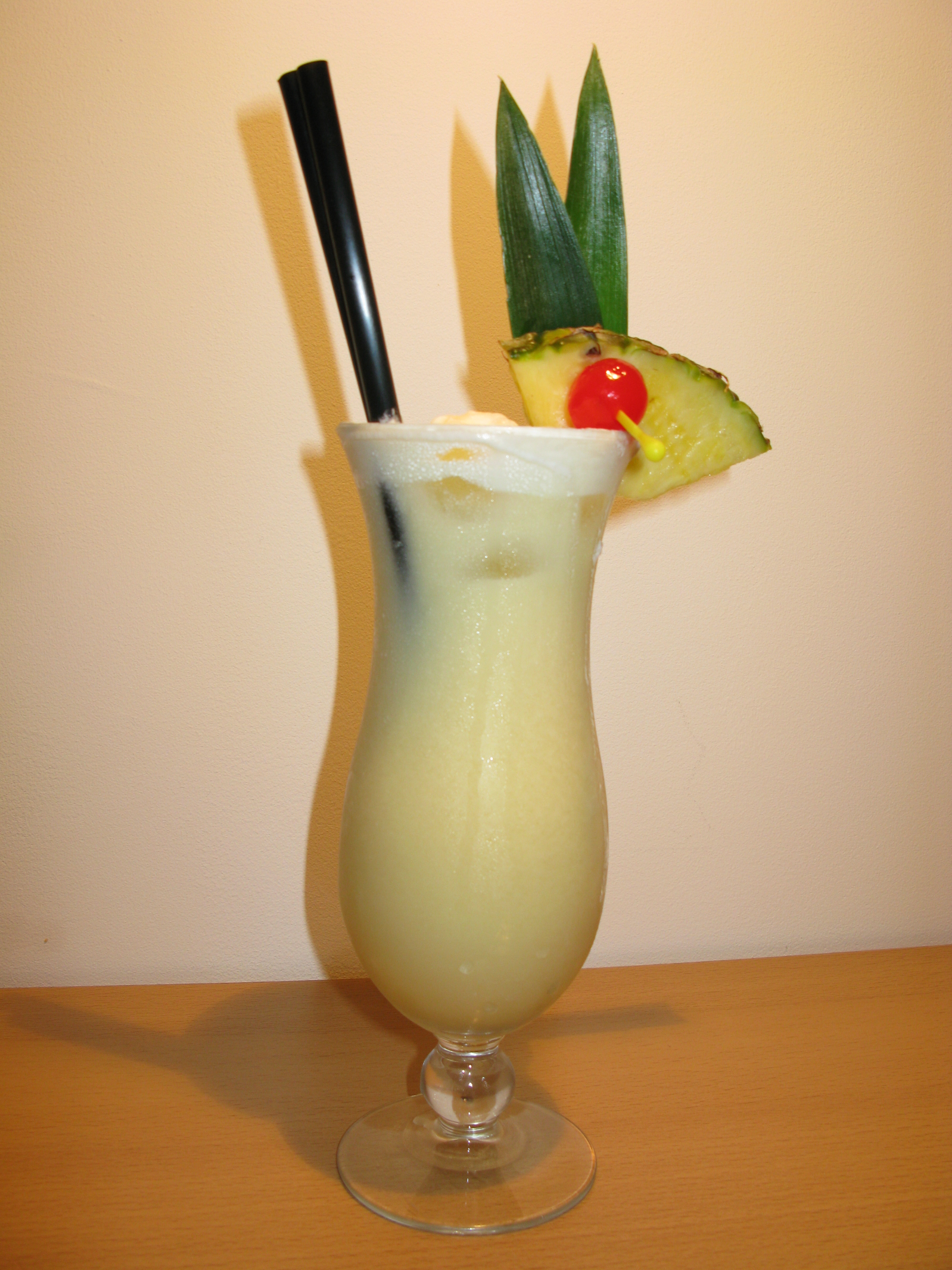 Foto einer Pina Colada (Rezeptur: 6cl Havana Club, 3cl Kokossirup, 2cl Obers, 12cl Ananassaft)